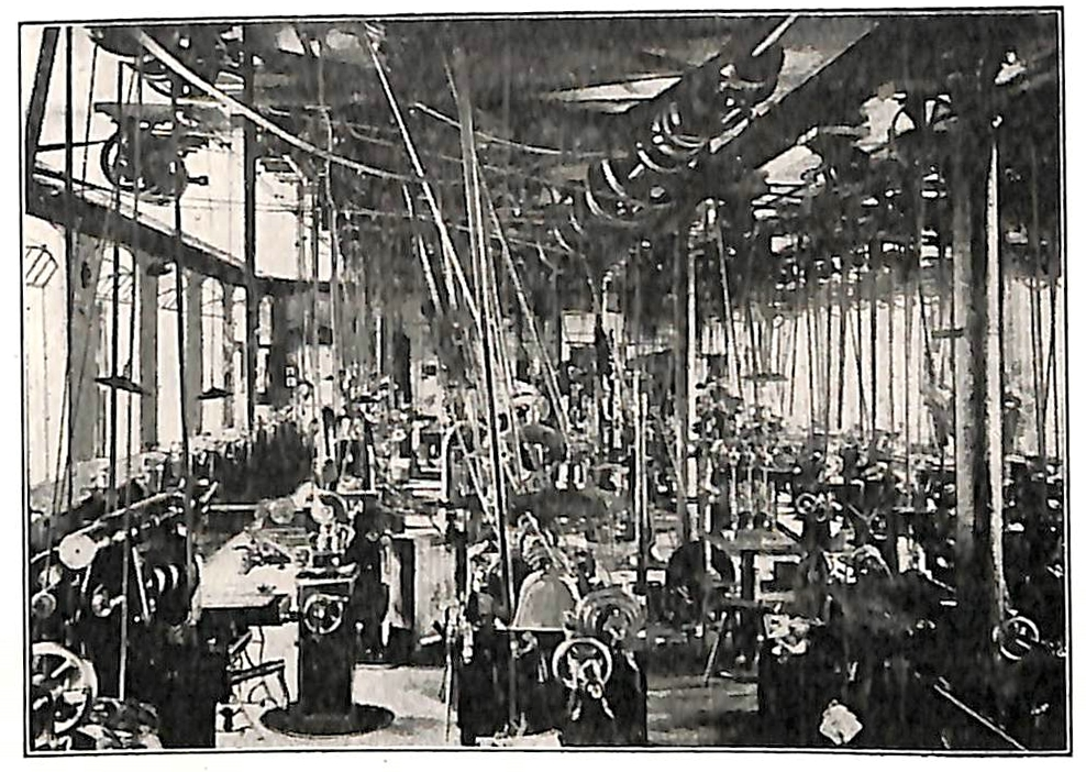 Kötzschenbroda - Schreibmaschinenteile-fertigung bei der Firma Schmidt.